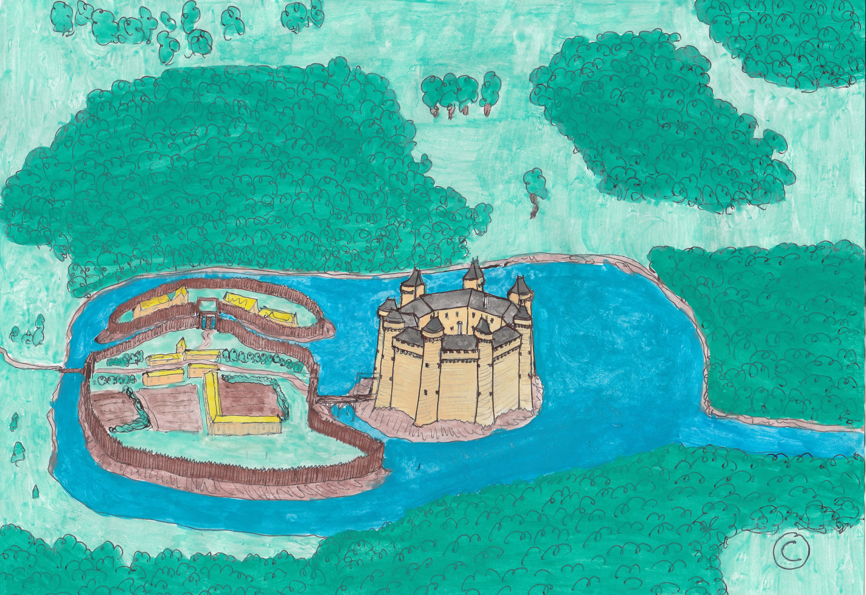 Aquarelle représentant le château fort de Commequiers style vue aérienne, vers la fin du Moyen-Age.